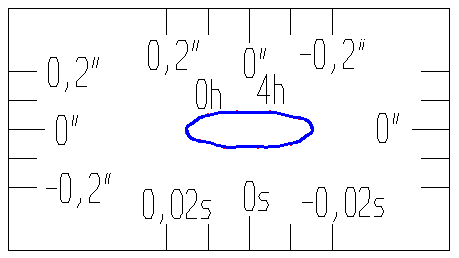 Az Aldebaran második egyenlítői koordináta változása a napi aberráció következtében a 46 fok északi szélességen, 1986. január 1-jén